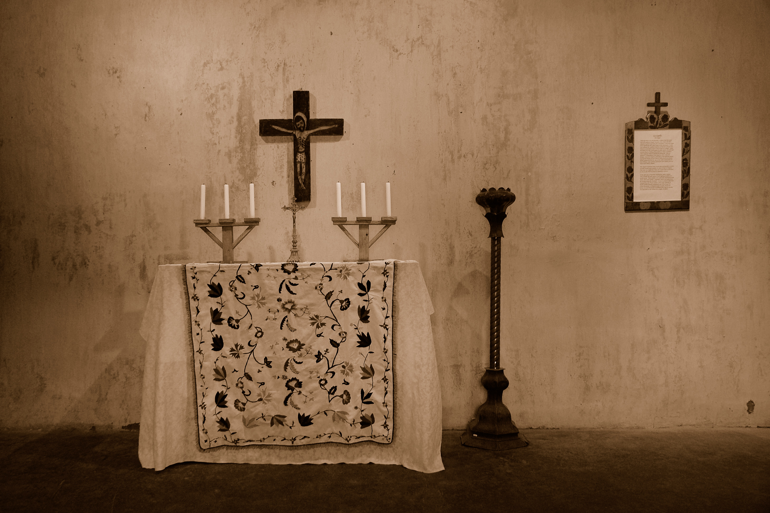 Family chapel in La Hacienda de los Martinez